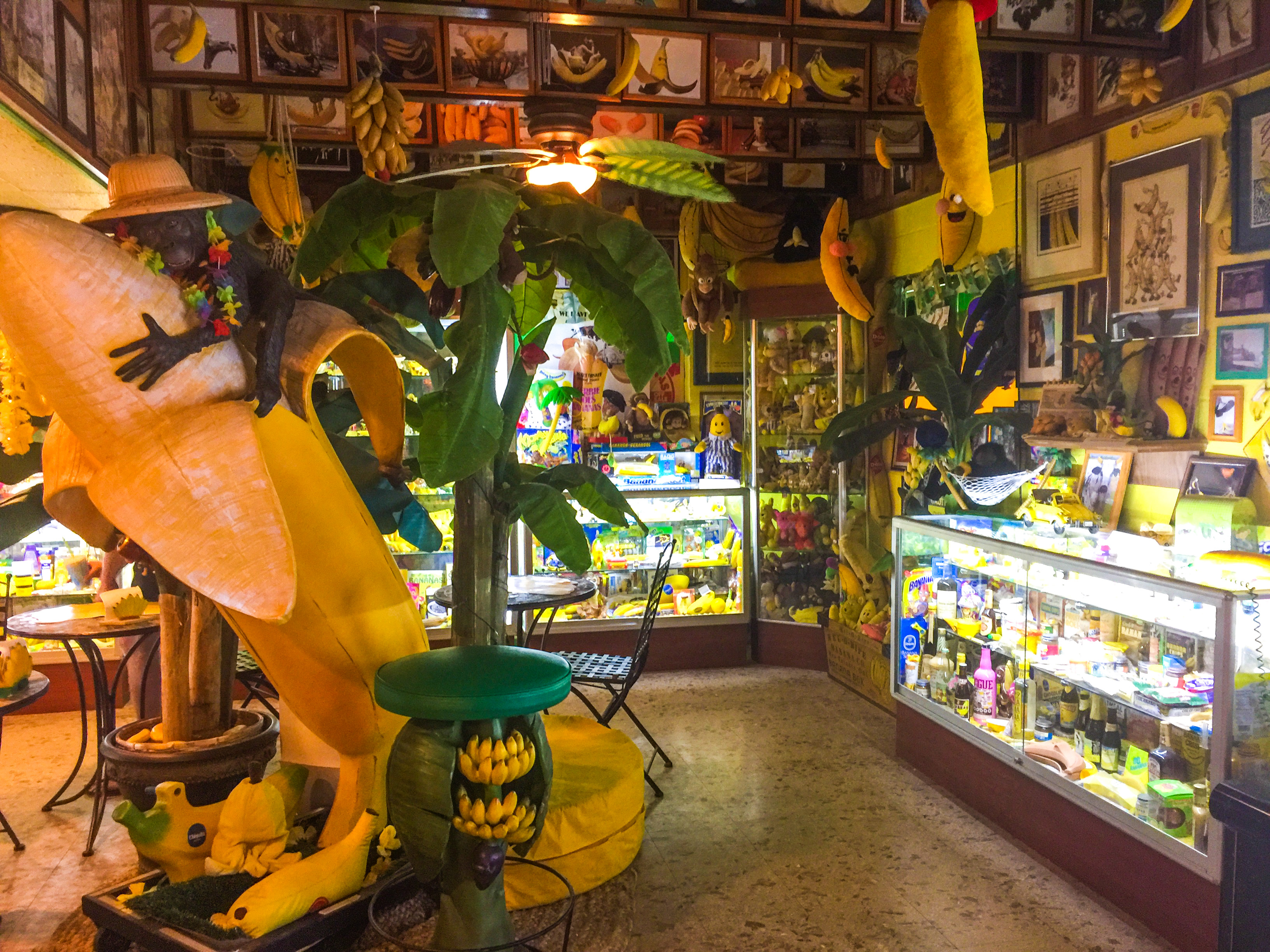 International Banana Museum